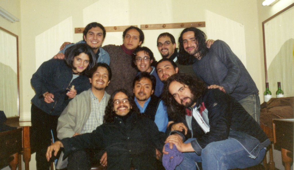 Guitarra en Mano (2004)